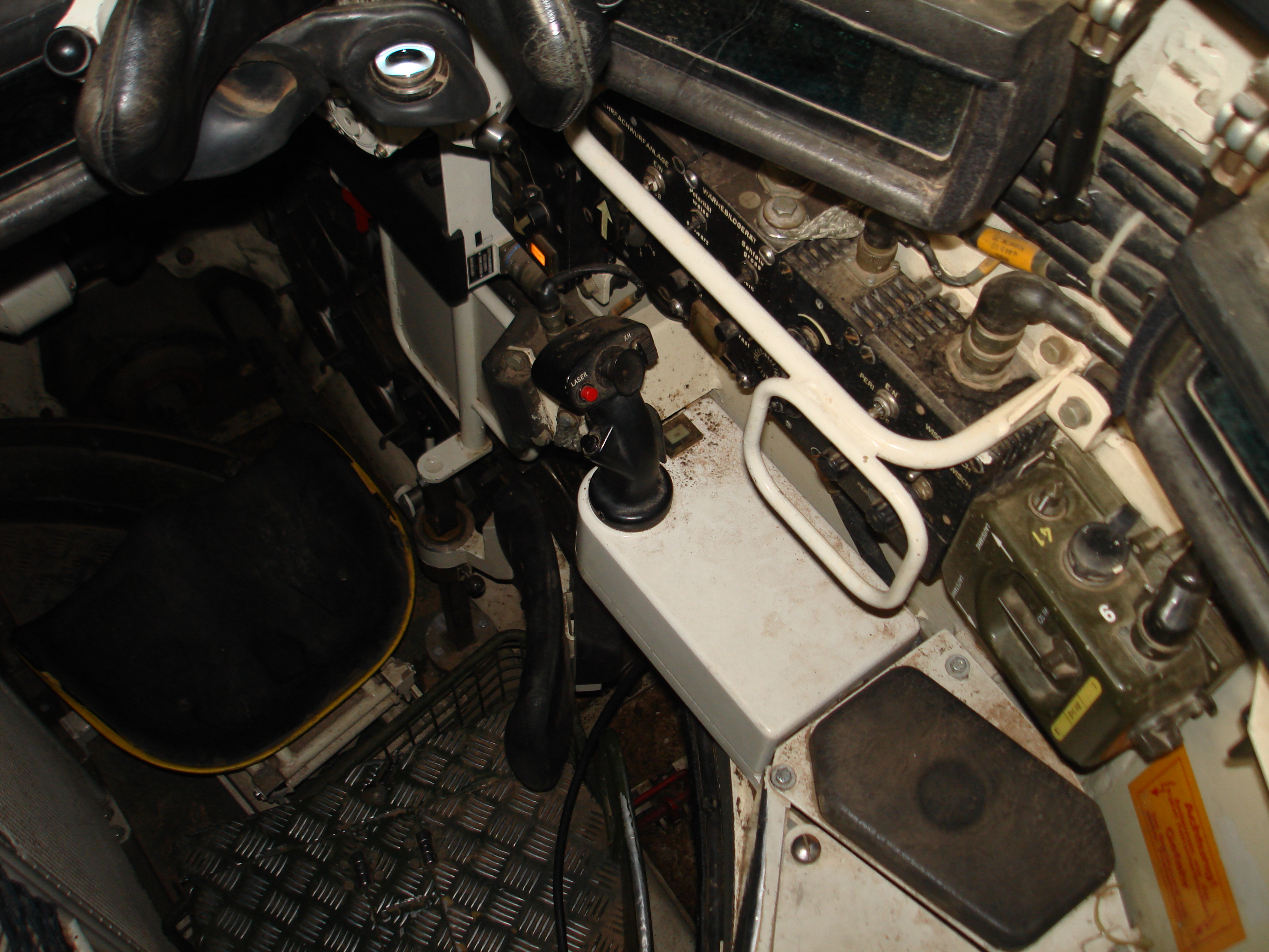 Kommandantenplatz im Leopard 2A4. Oberhalb im Bild der monokulare (Ein-Auge-Einblick) Einblick in das PERI. Bildmitte der Richtgriff, rechts davon die Bediengeräte für die Feuerleitanlage (mit den Modi: Turm aus, Beobachten sowie Stab ein), die Mehrfachwurfanlage, das Wärmebildgeräte und PERI. Der Sitz im unteren Bereich gehört zum Richtschützenplatz.